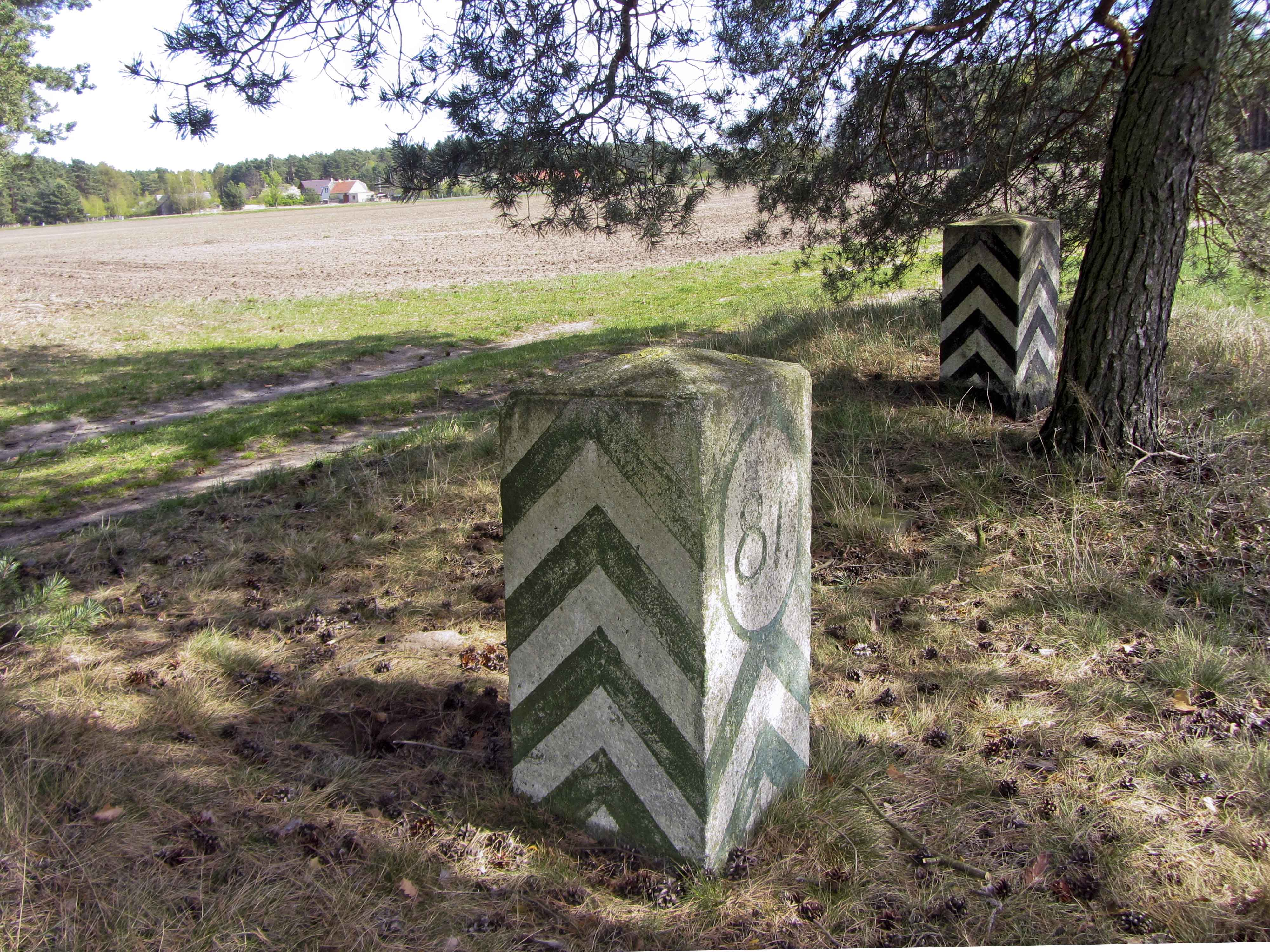 Grenzstein Nr. 81 Historische Landesgrenze Königreich Sachsen Königreich Preußen 1815 (Wiener Kongress) Hornjoserbsce: Historiski saksko-pruski měznik čo. 81 pola Lěskeje (1815)